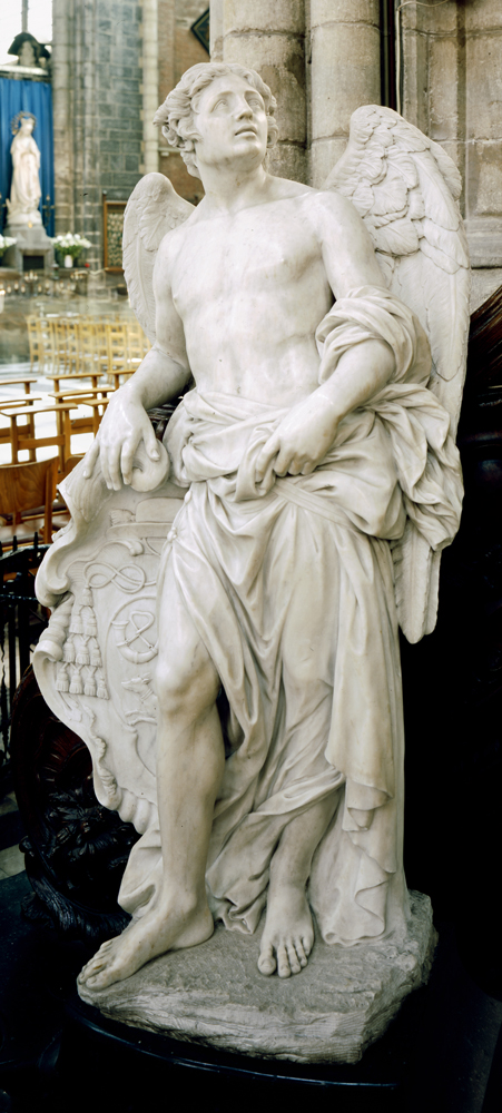 Sint-Baafskathedraal, Gent Laurent Delvaux, Preekstoel, 1741-1745; inv: 122